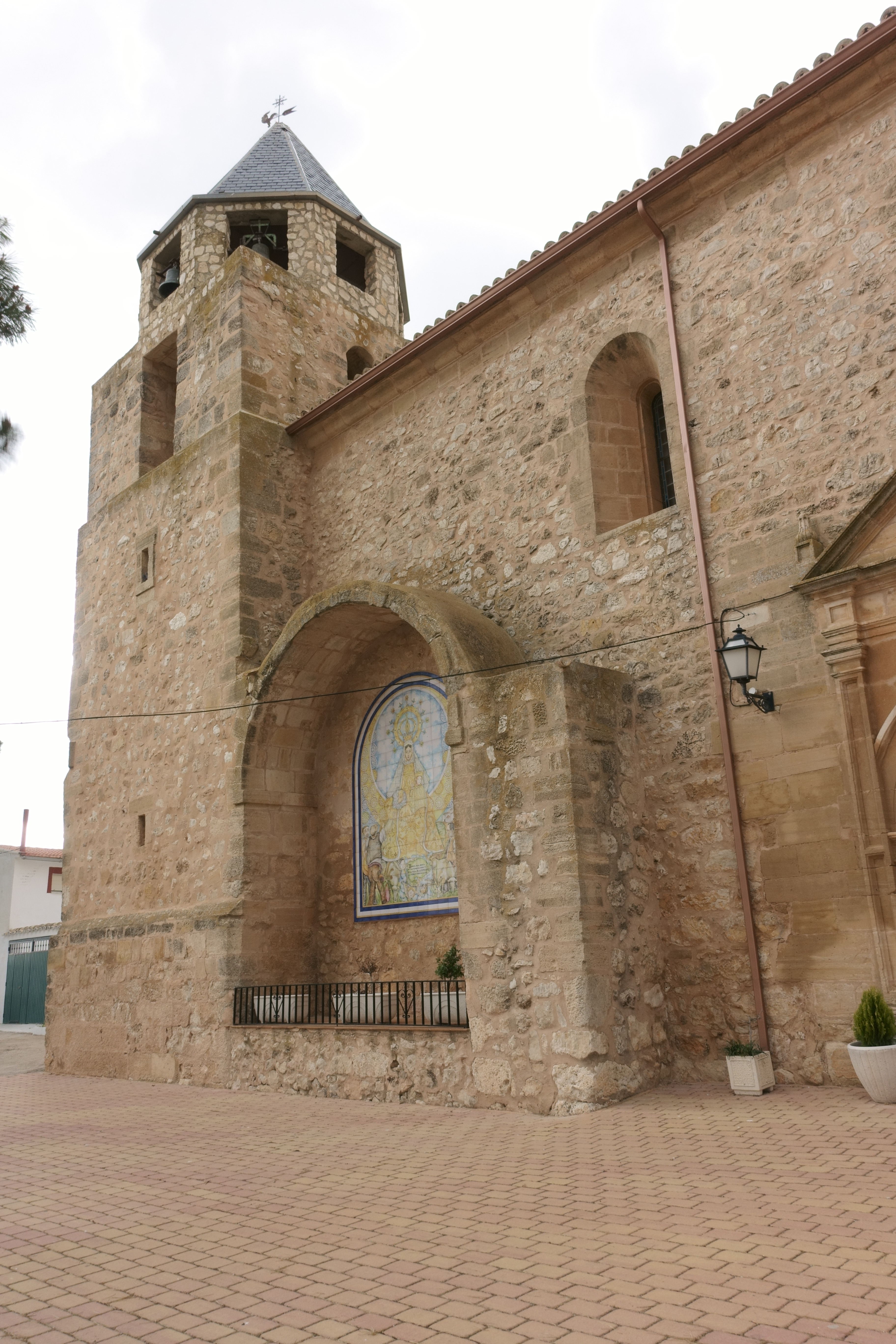 Iglesia de Nuestra Señora de la Estrella, en Alconchel de la Estrella (Cuenca, España).